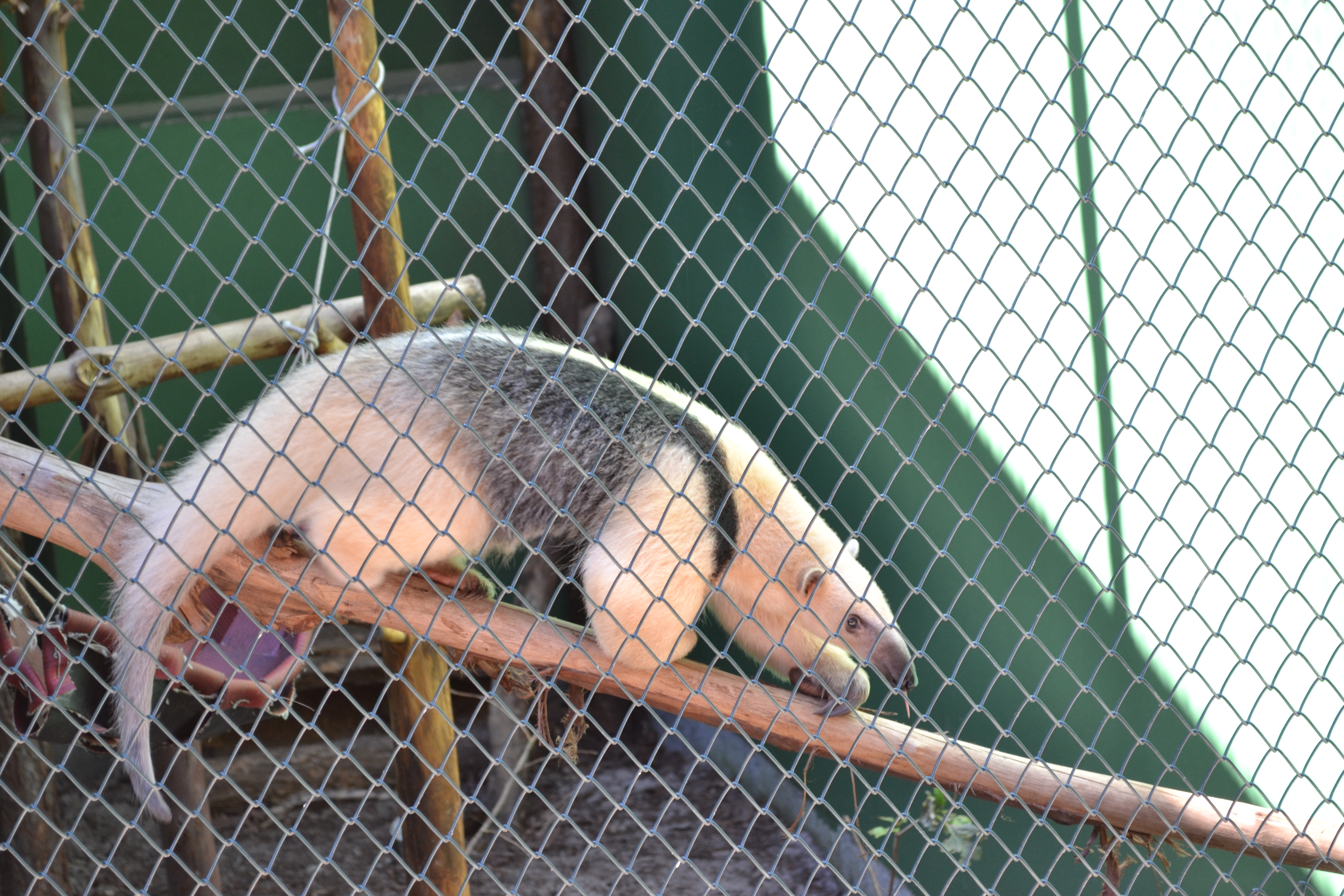 Tamanduá em seu habitat na trilha